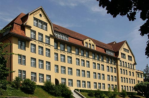 Biel: Gymnasium Alpenstrasse